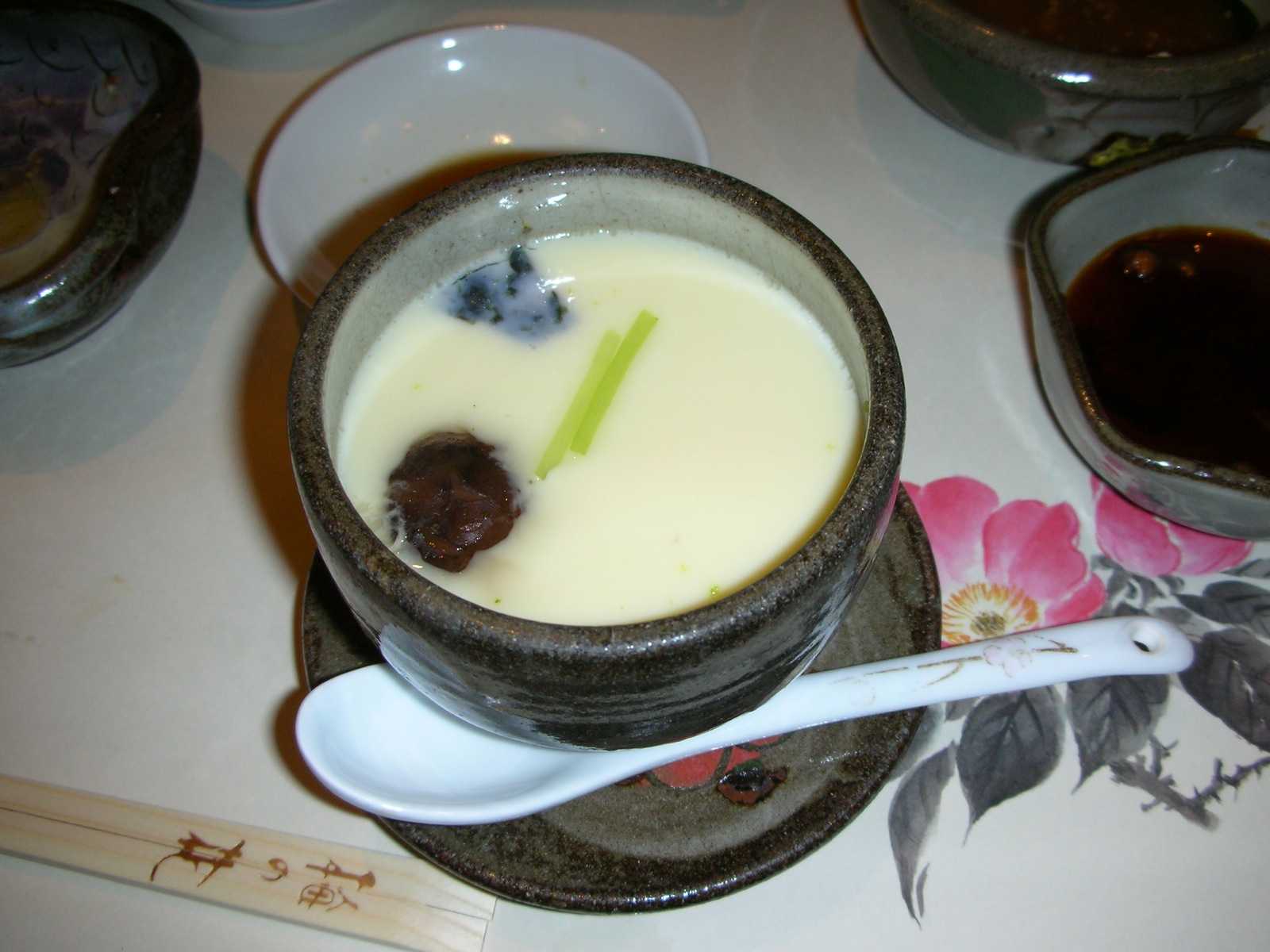 ChawanmushiDSCN0877.JPG